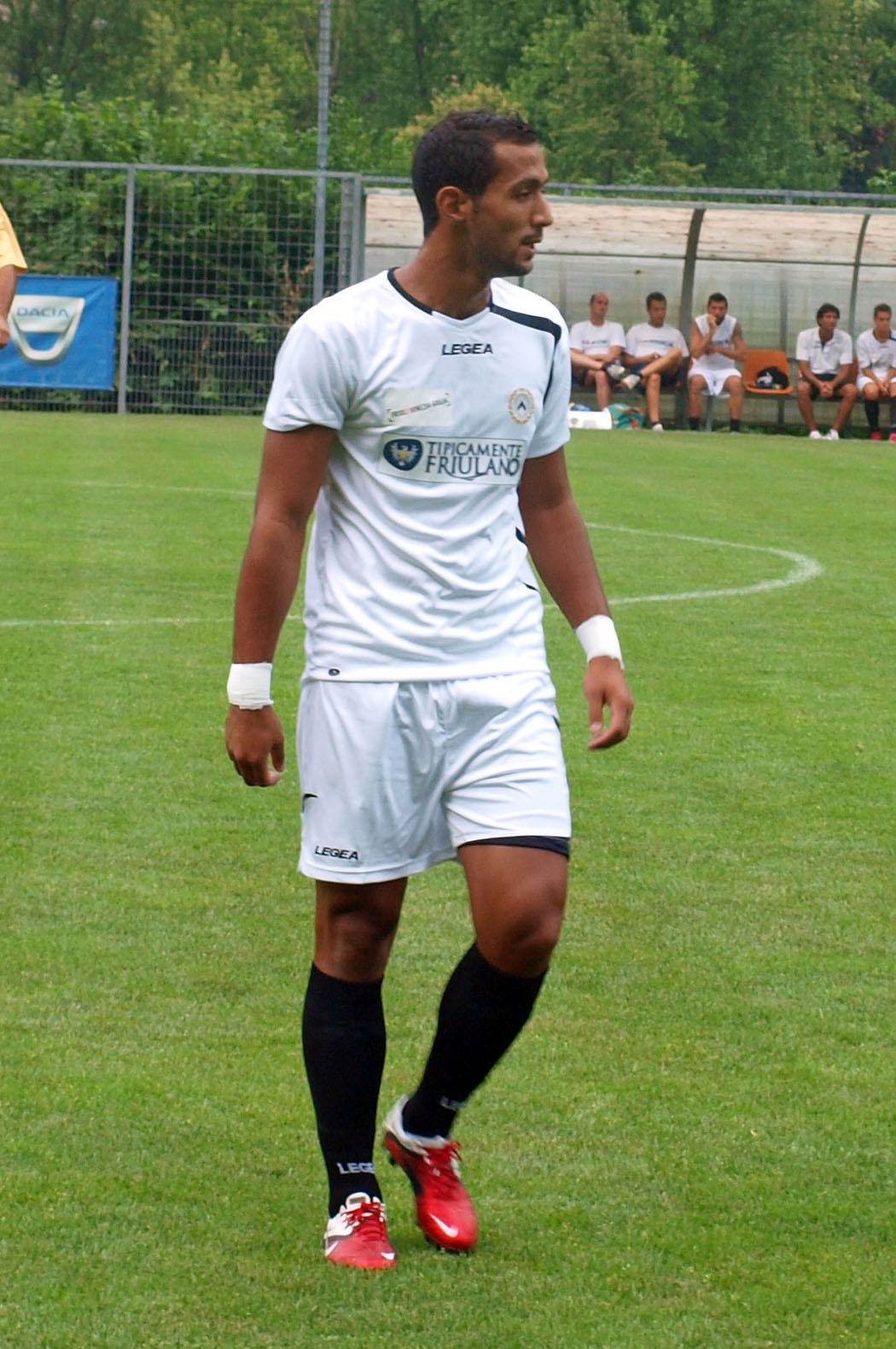 Il calciatore francese, naturalizzato marocchino, Mehdi Benatia con la maglia dell'Udinese nel 2011.